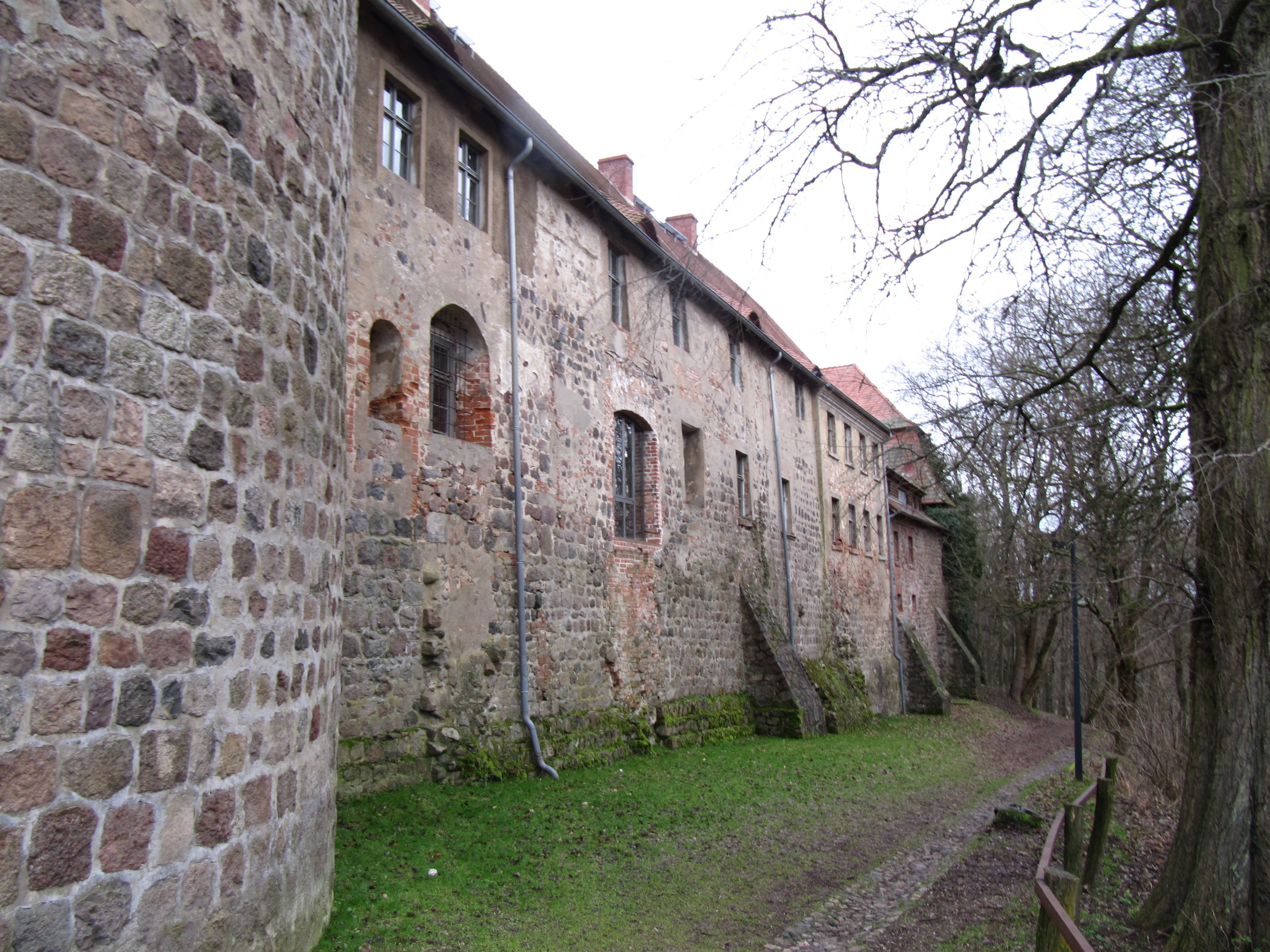 burg rabenstein (fläming) von außen